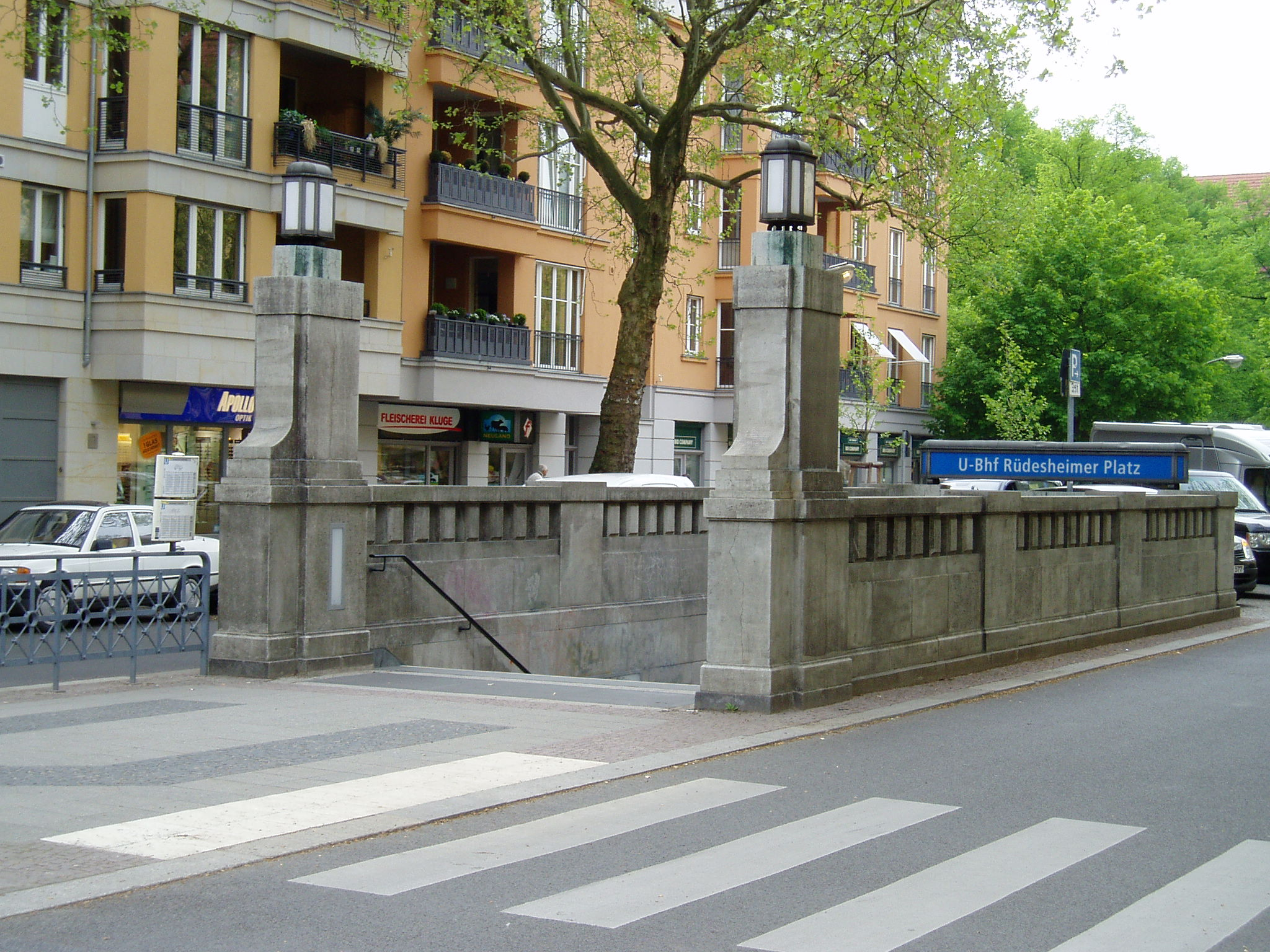 Berlin U-Bahnhof Rüdesheimer Platz, nördlicher Zugang